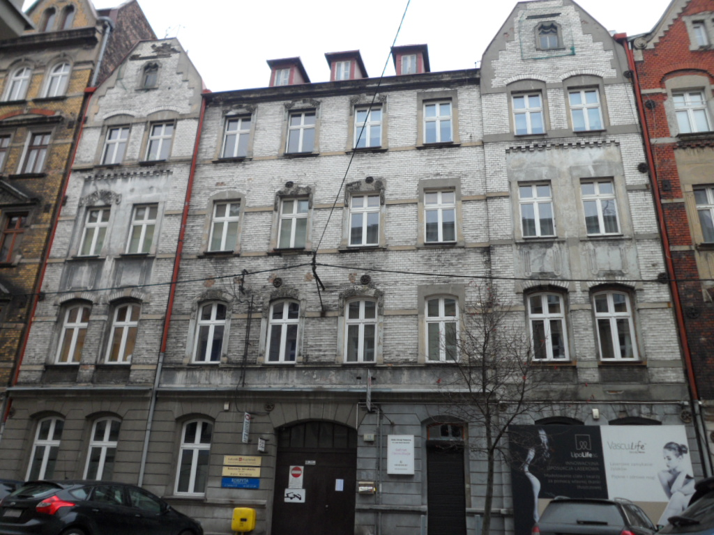 Budynek przy ul. Zabrska 11 (dawniej Lessingstraße 11) w Katowicach. W tym budynku 5 lutego 1905 r. doszło do założenia klubu piłkarskiego FC Preußen Kattowitz z inicjatywy braci Fonfarów -Emila i Rudolfa.